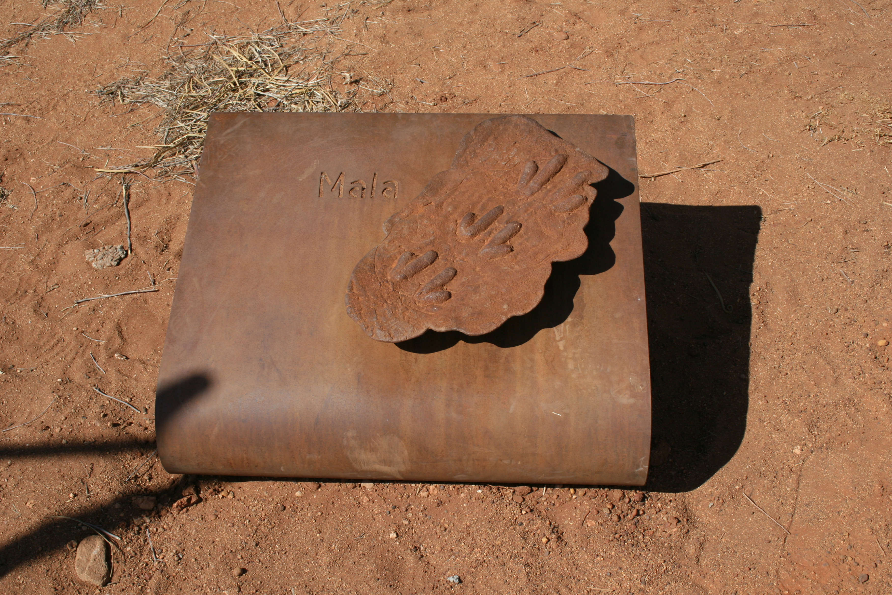 Metall-Hinweis am Uluru, ca. 40 x 40 cm